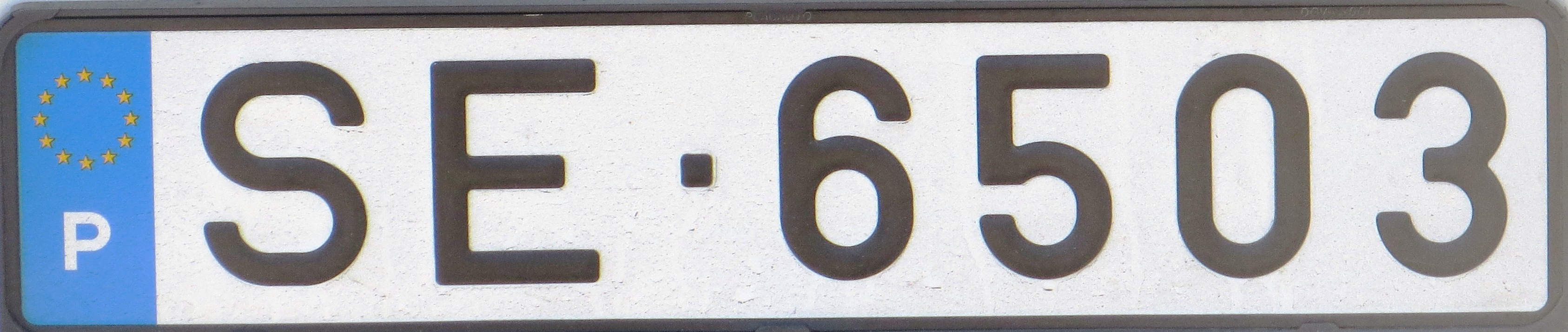 Trailer kenteken Portugal